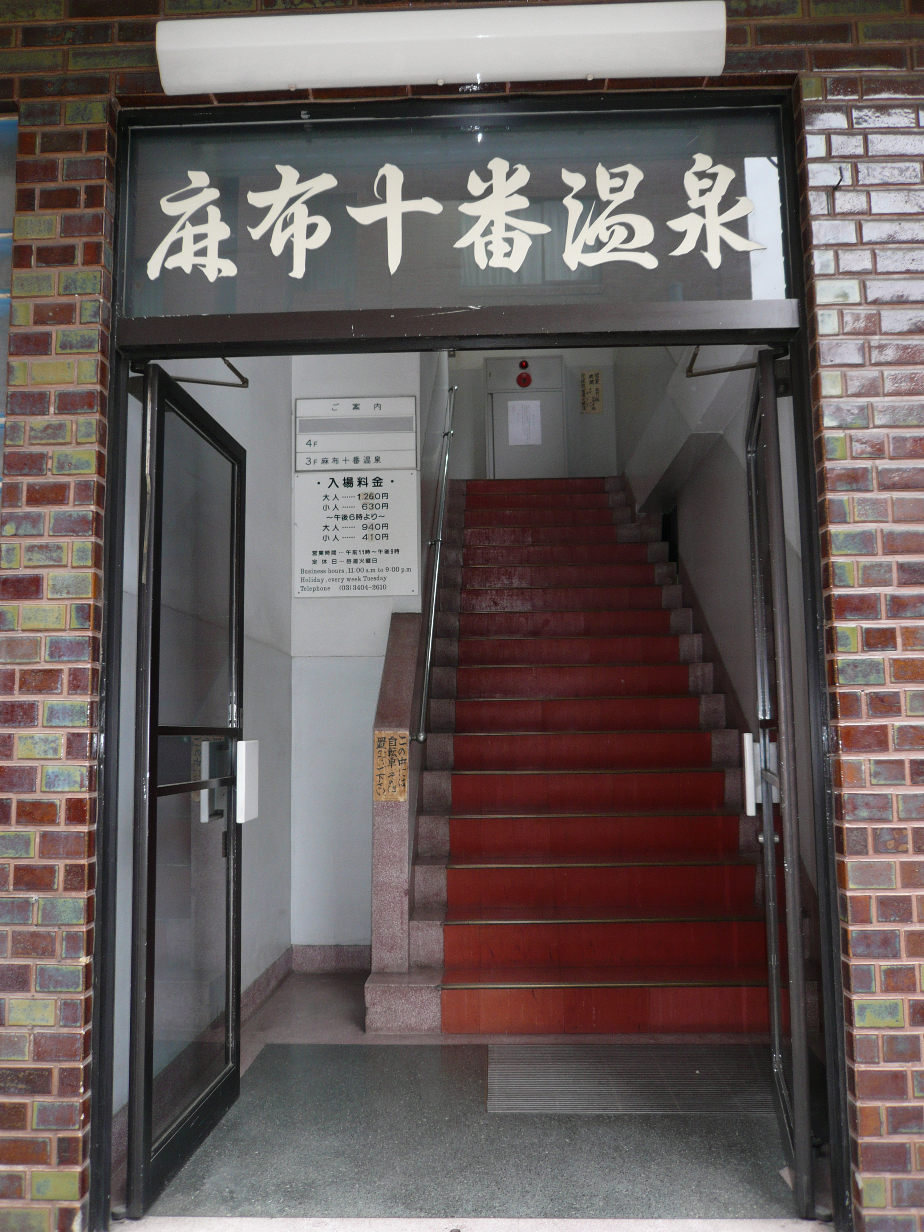 麻布十番温泉の入口。